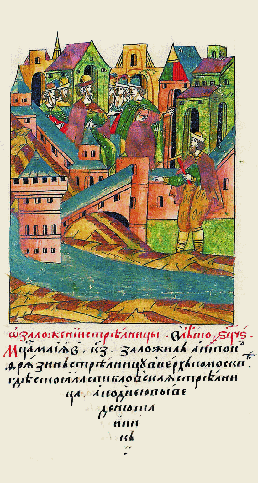 О заложении стрель- ницы. В 6996 году месяца мая в 27 день заложил Антон Фря- зин стрельницу вверх по Москве где стояла Свибловская стрель- ница, а под нею был устроен тайник.